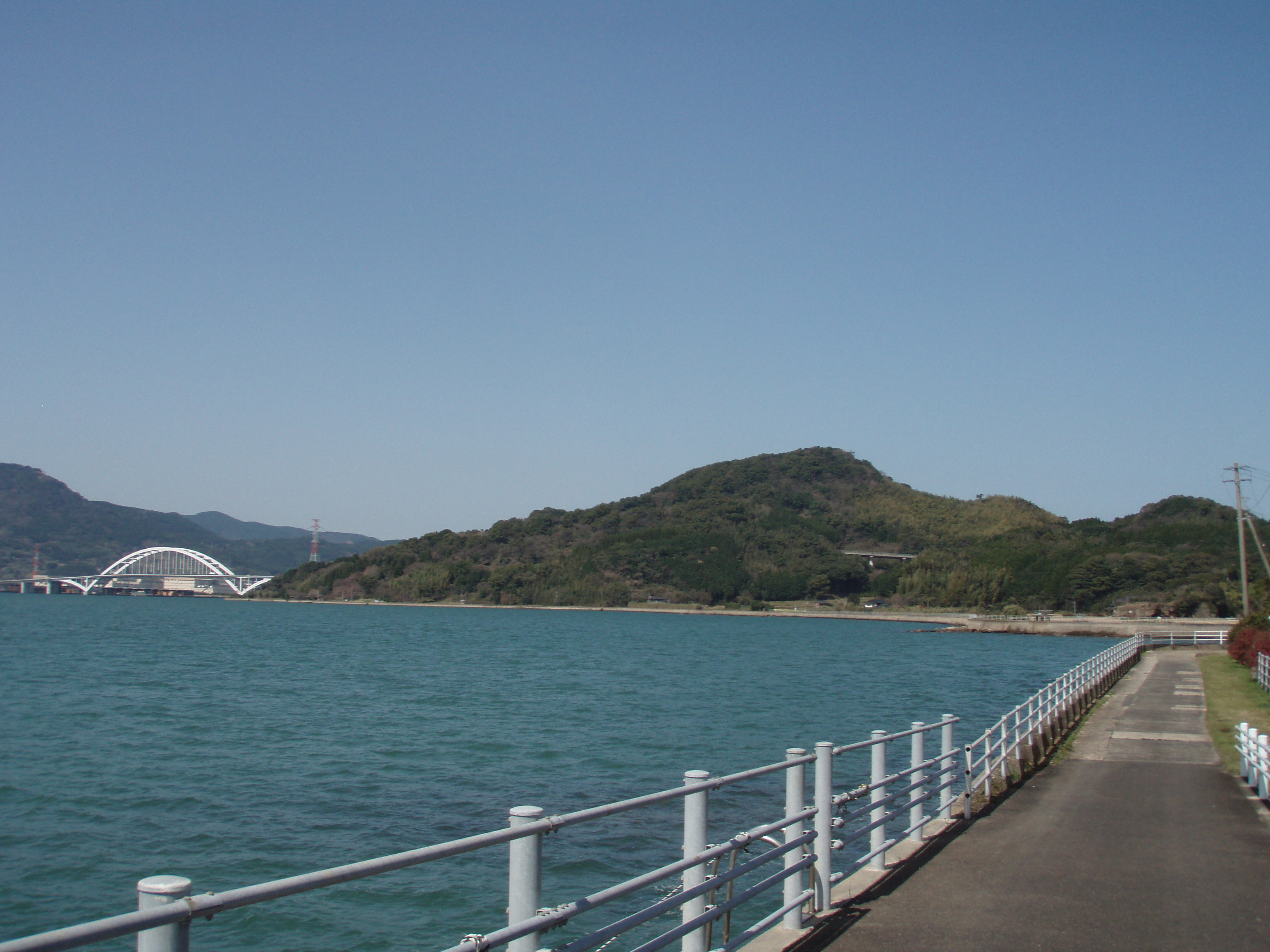 伊万里湾多々良海岸沿いにて自分自身が撮影。